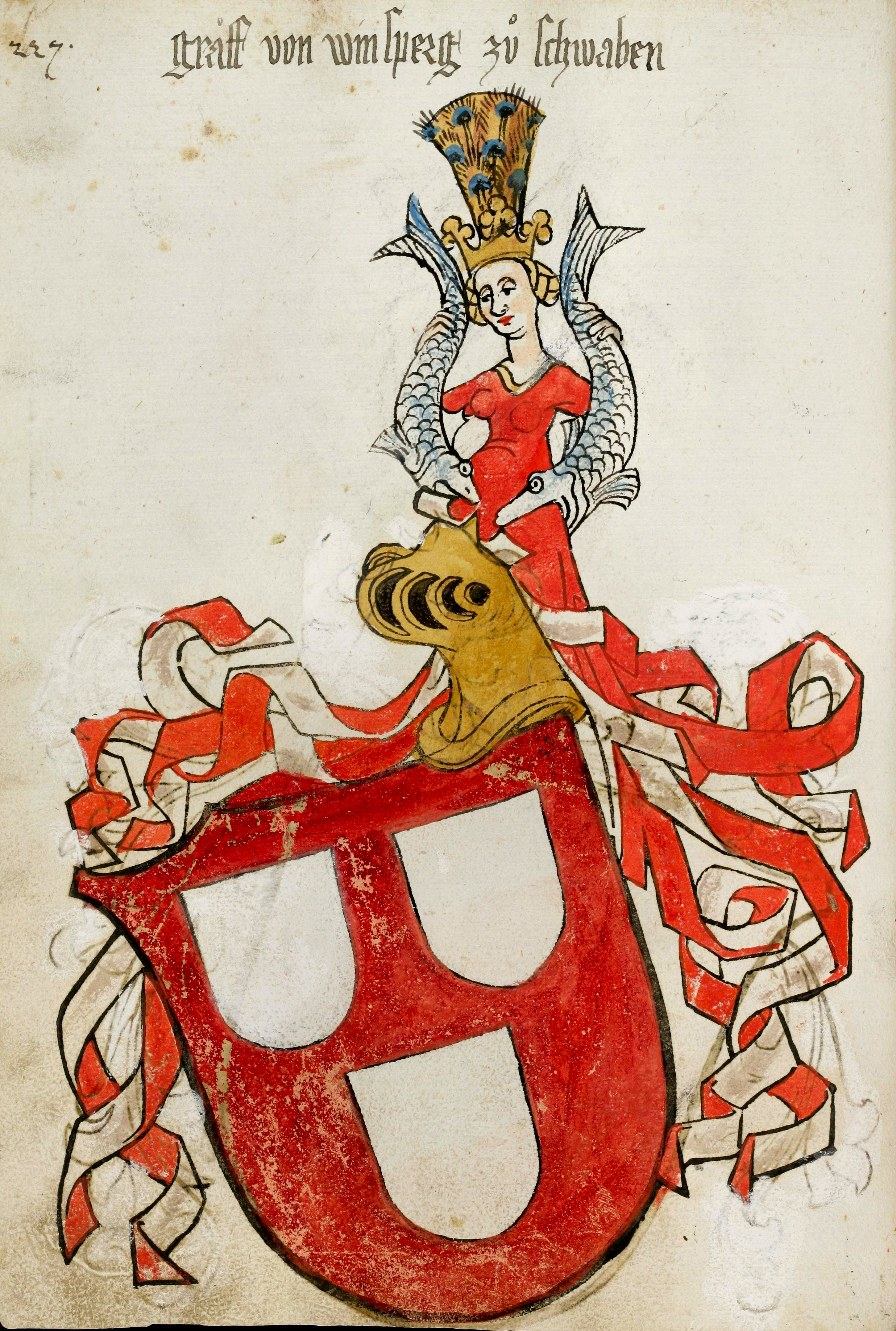 Wappenbuch des St. Galler Abtes Ulrich Rösch; Stiftsbibliothek St. Gallen, Cod. sang. 1084 Wappen: Graf von Weinsberg